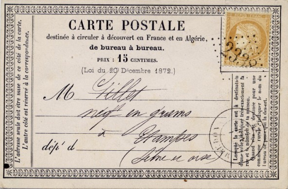 Carte postale de 1874, recto (collection Bernard Gineste)